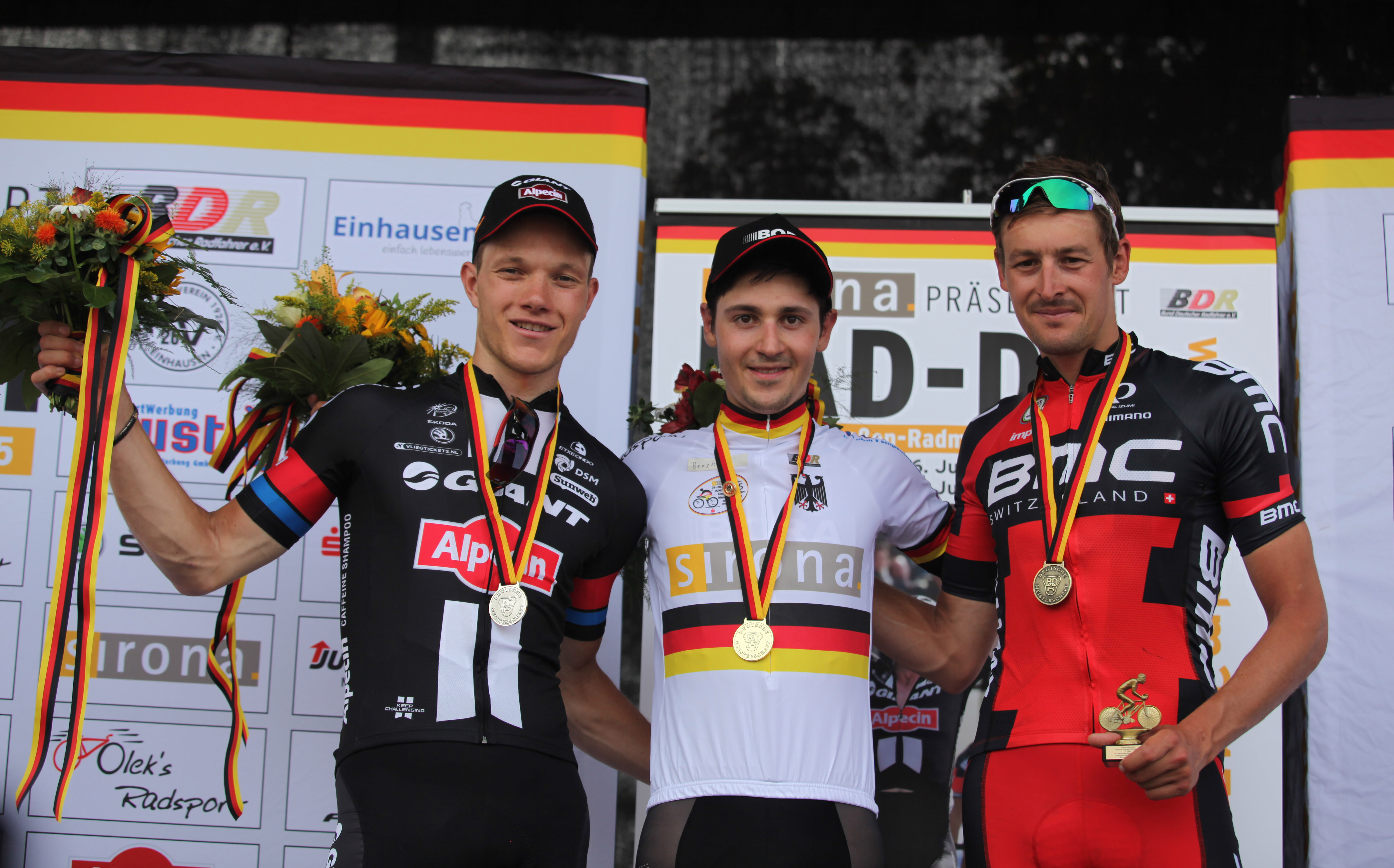 Emanuel Buchmann (Bildmitte), Nikias Arndt (links) und Marcus Burghardt (rechts) bei der Siegerehrung. Foto von den Deutschen Meisterschaften im Straßenrennen der Männer (Elite) am 28. Juni 2015 in Bensheim (Hessen)